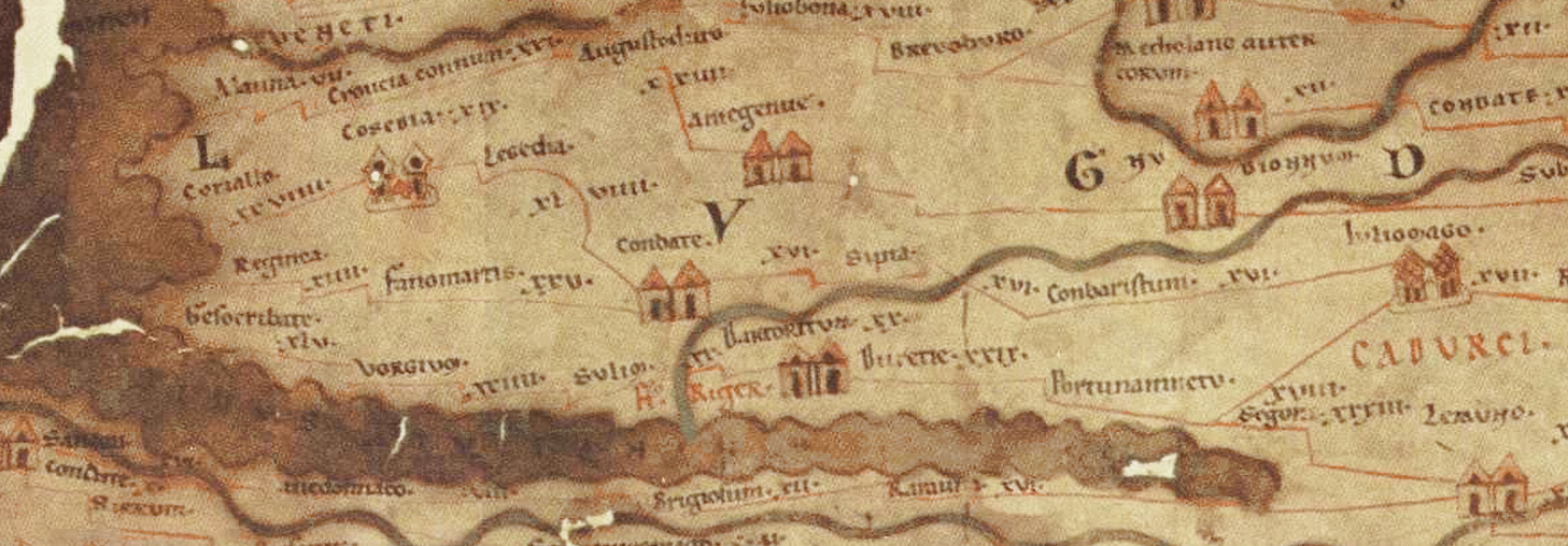 Extrait de la Table de Peutinger (Segm. I, 2, o) concernant la Bretagne, et le nord de la France.